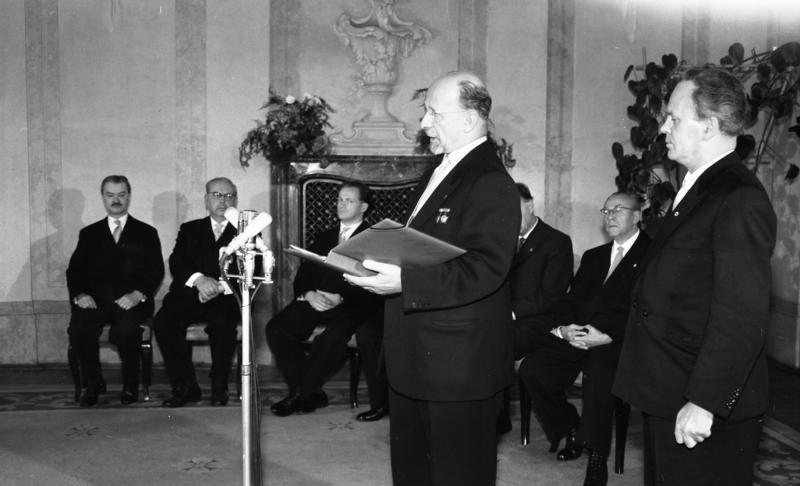 Berlin, Ulbricht empfängt diplomatisches Korps Zentralbild Zühlsdorf 26.9.1960 Walter Ulbricht empfing Diplomatisches Korps. Der Vorsitzende des Staatsrates der Deutschen Demokratischen Republik, Walter Ulbricht, empfing am 26.9.1960 im Amtssitz des Staatsrates in Berlin-Niederschönhausen das Diplomatische Korps. Erschienen waren die in der Deutschen Demokratischen Republik akkreditierten Diplomatischen Vertreter sowie die Leiter der Handelsvertretungen der Vereinigten Arabischen Republik und der Republik Finnland unter Leitung des amtierenden Doyen, CSSR-Botschafter Otto Klicka. UBz: Walter Ulbricht während seiner Ansprache. Rechts davon: der Sekretär des Staatsrates Otto Gotsche. Im Hintergrund sitzend (v.r.n.l.) Otto Grotewohl, Manfred Gerlach, Dr. Lothar Bolz und Sepp Schwab. Abgebildete Personen: Ulbricht, Walter: Staatsratsvorsitzender, Erster Sekretär des Zentralkomitees (ZK) der SED, Vorsitzender des Nationalen Verteidigungsrates, DDR Gotsche, Otto: Schriftsteller, Mitglied des Zentralkomitees (ZK) der SED, DDR Grotewohl, Otto: Ministerpräsident, stellvertretender Staatsratsvorsitzender, DDR Gerlach, Manfred Dr.: Stellvertretender Staatsratsvorsitzender, Vorsitzender der Liberal-Demokratischen Partei Deutschlands (LDPD), DDR Bolz, Lothar Dr. jur.: Stellvertretender Ministerratsvorsitzender, Außenminister, DDR Schwab, Sepp: Stellvertretender Außenminister, Botschafter in Ungarn, DDR